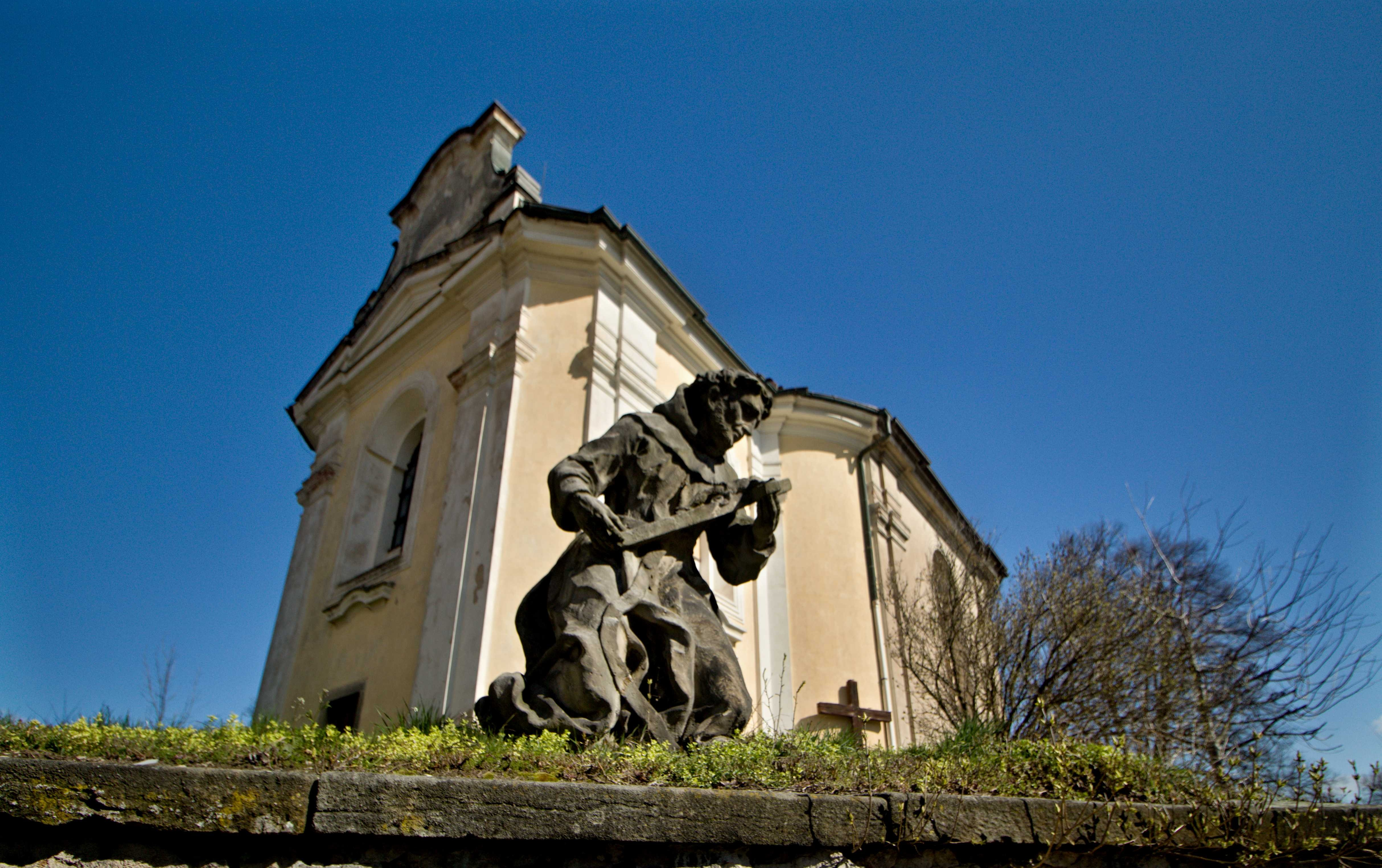 Kostomlaty nad Labem, okres Nymburk